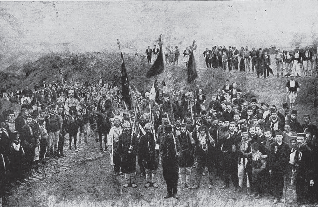 IMARO cheti in Debar